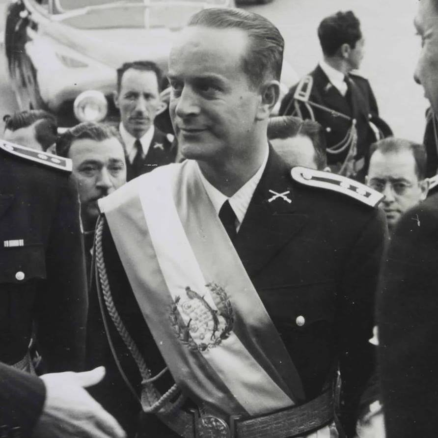 Presidente Jacobo Árbenz Guzmán durante su nombramiento como Comandante de las Fuerzas Armadas.